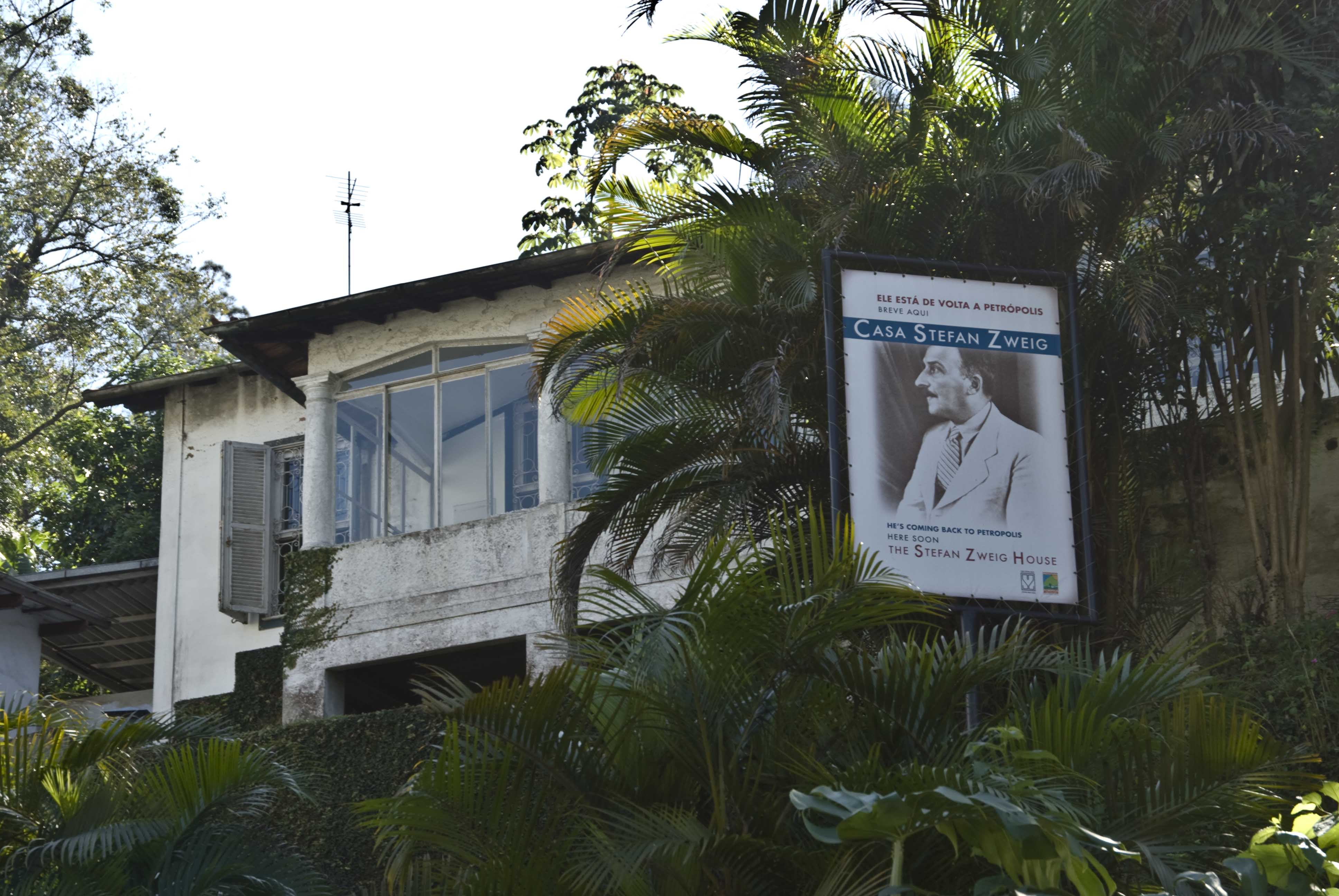 Ehemaliges Wohnhaus von Stefan Zweig in Petropolis